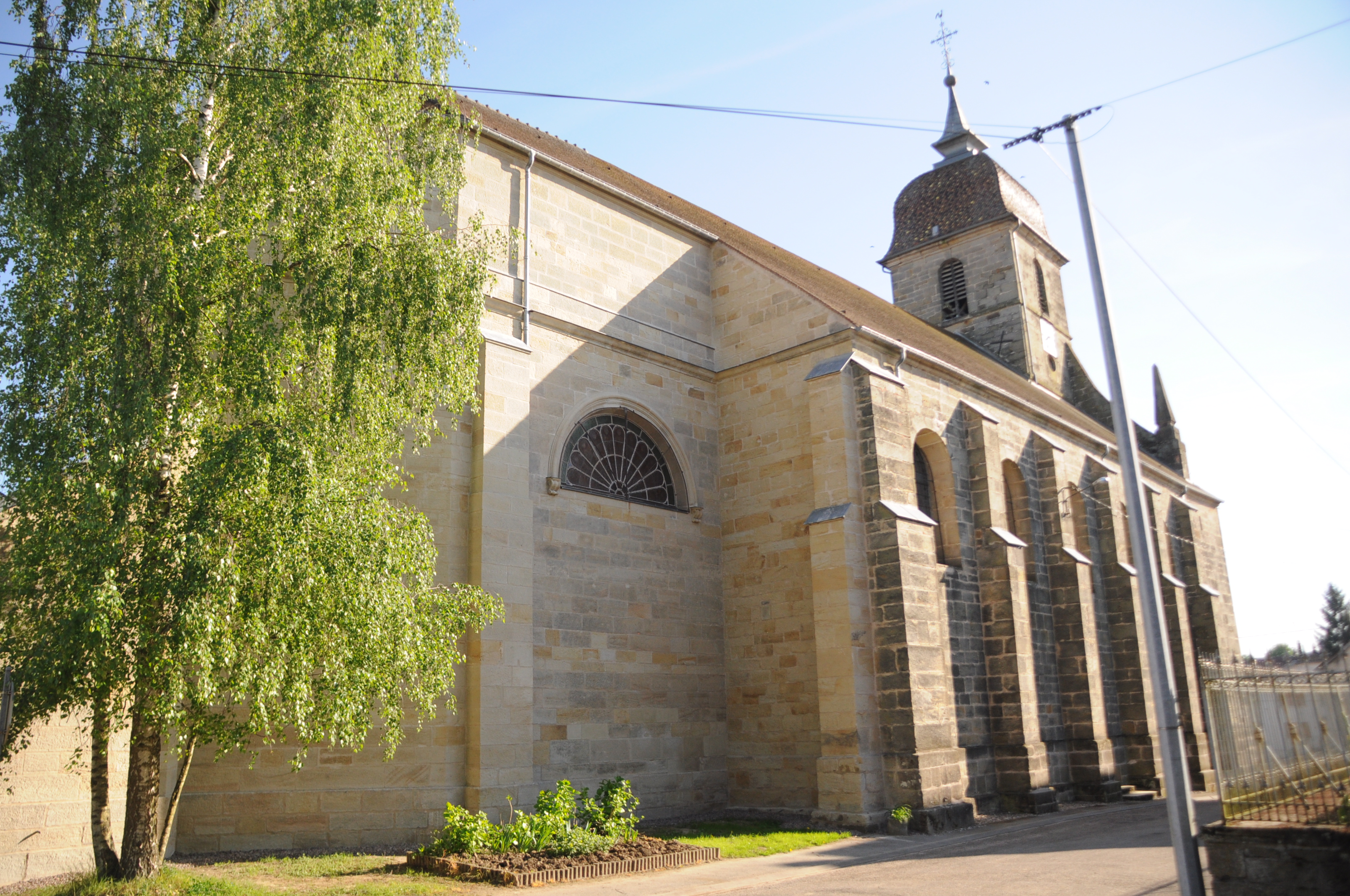 Église de l'Assomption de Cemboing .